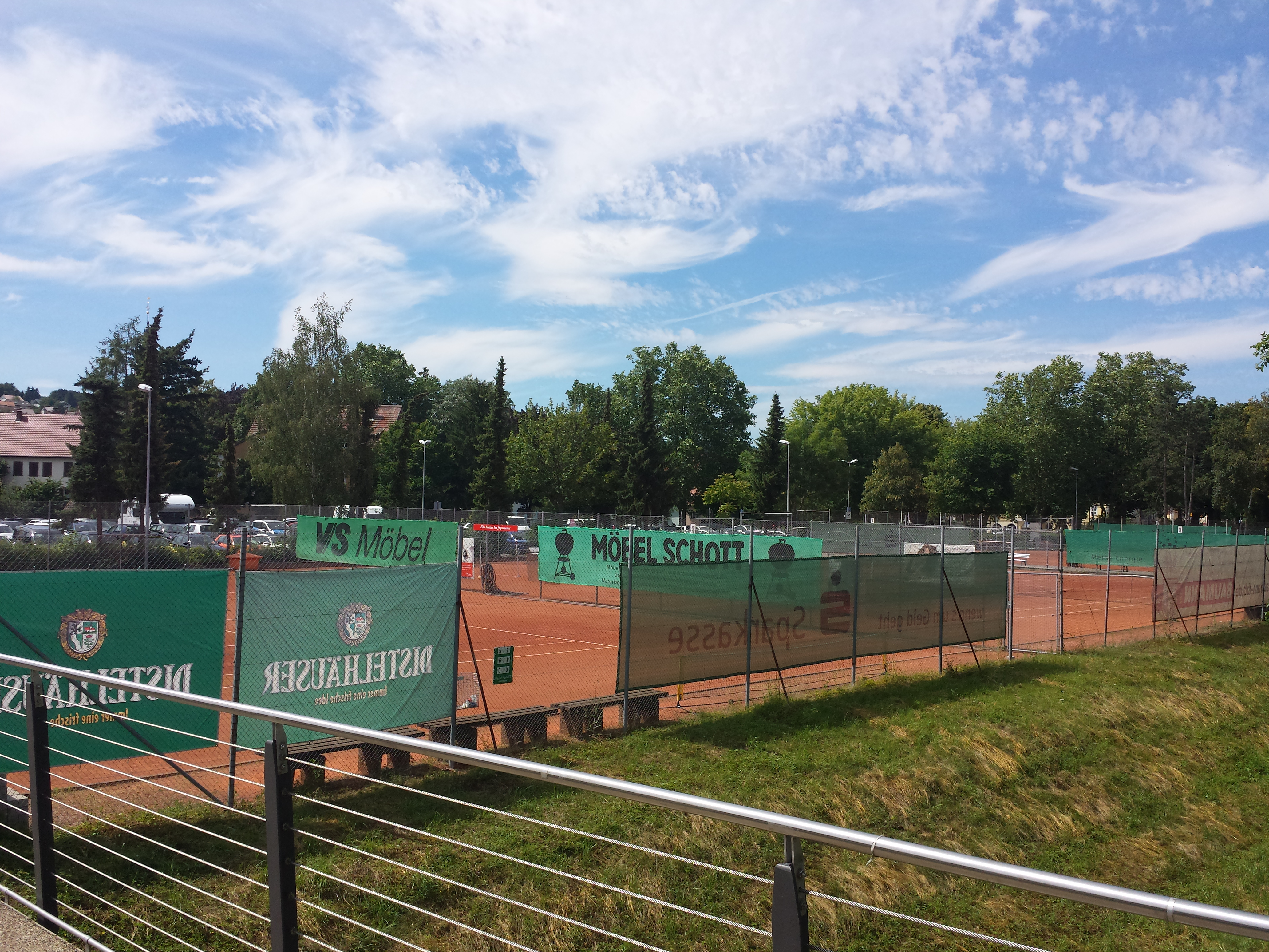 Tennisplätze der Tennisabteilung des TSV Tauberbischofsheim.